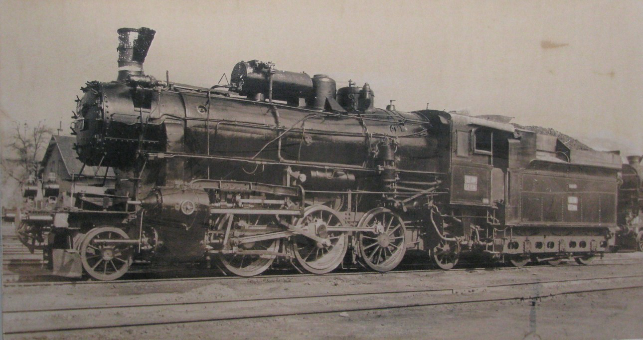 Parna lokomotiva JŽ serije 22. Fotografija iz Tehničkog muzeja u Zagrebu